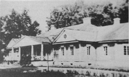 Беларуская (тарашкевіца): Геранёны (Gieraniony), сядзіба Корвін-Мілеўскіх (Korvin-Mileŭski)